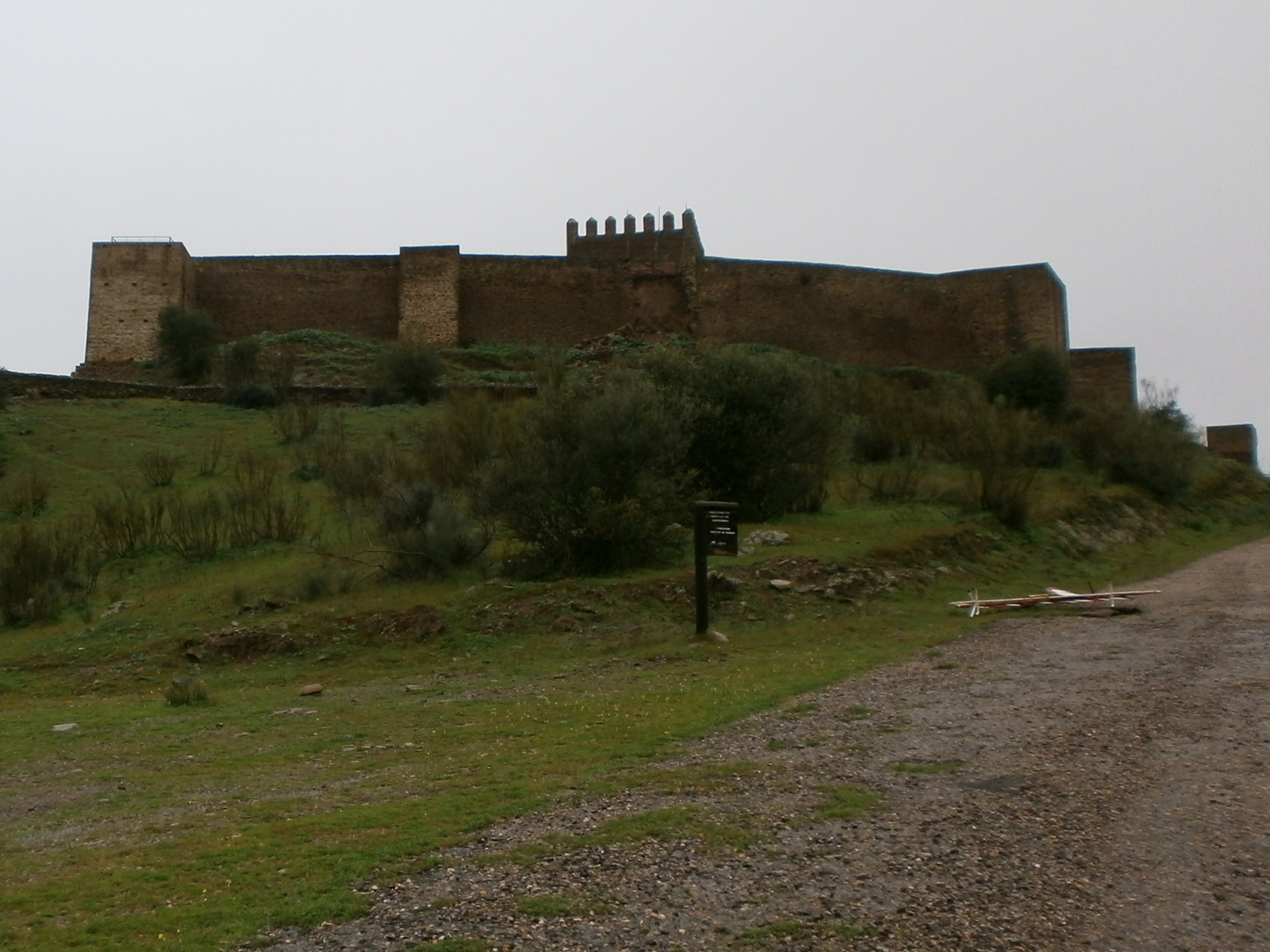 Castelo de Noudar - vista geral a partir da estrada.